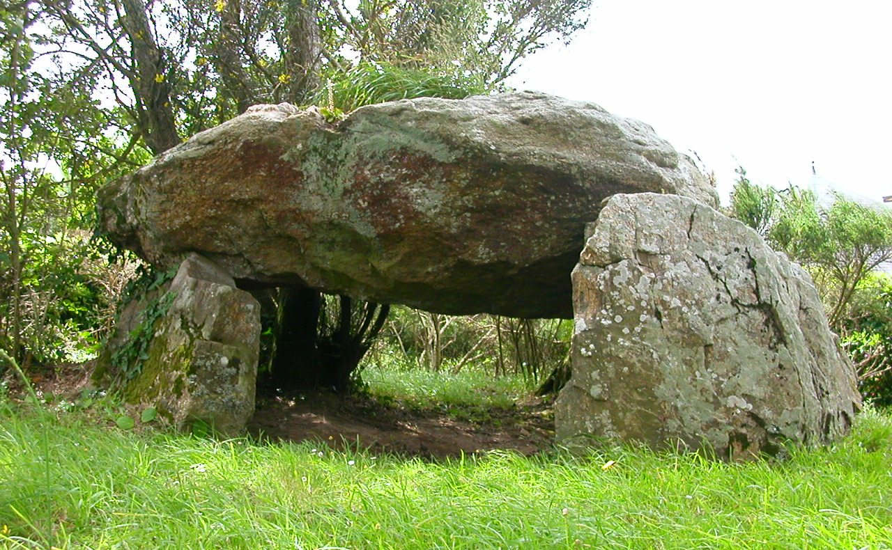 Dolmen de Gornevèse, Séné, Pays de Vannes, Bretagne